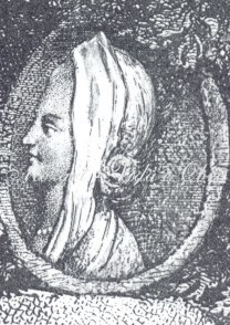 Anna Lucia de Amicis (ca. 1733–1816), von Mozart bewunderte neapolitanische Sopranistin